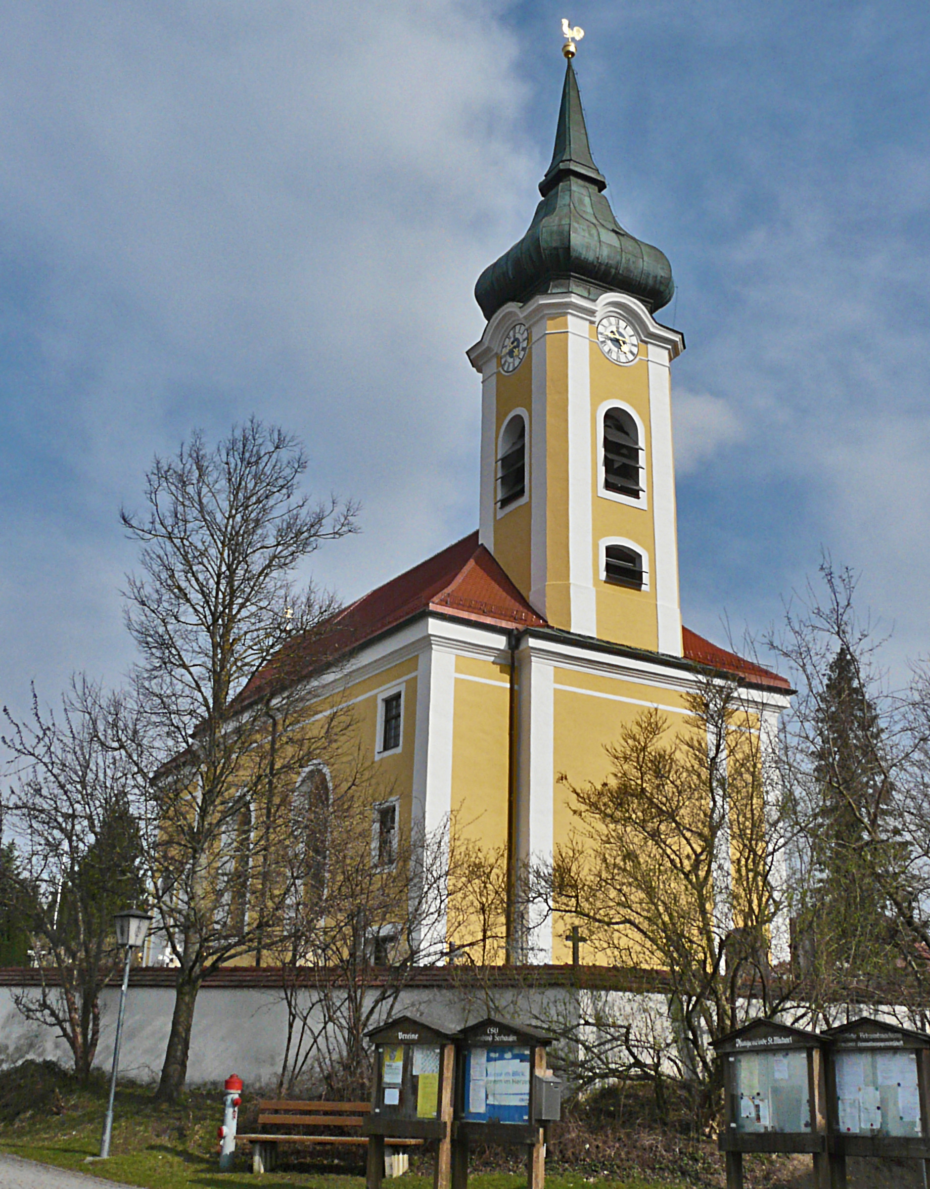 Kirche in Seehausen am Staffelsee